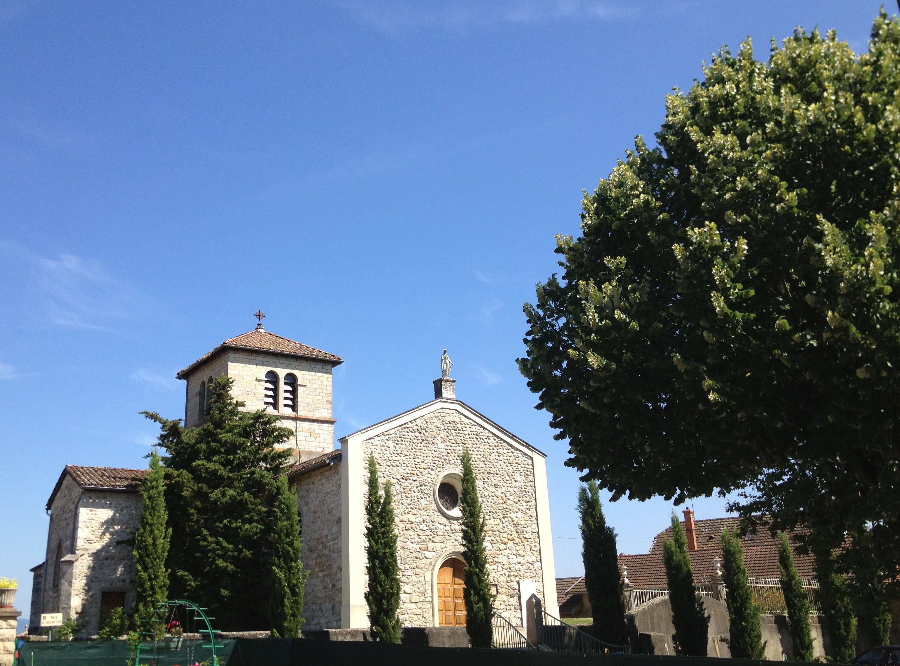 Église de l'Assomption de Charnoz-sur-Ain.